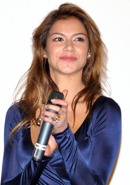 Catalina Denis à l'avant-première du film Le Mac.